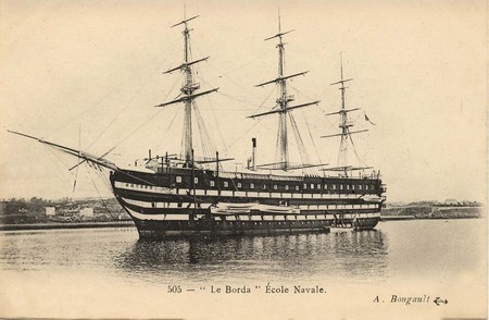 L'intrépide (ou Borda IV"), navire de l'Ecole d'application de la Marine